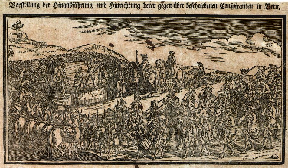 Darstellung der Hinrichtung von Samuel Niklaus Wernier, Samuel Henzi und Emanuel Fueter, 1749; möglichwerweise Illustration aus der Zeitschrift Der hinkende Bot.